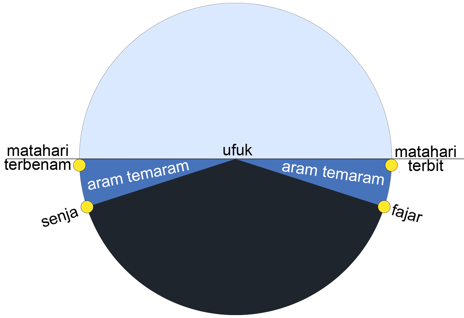 Skematik yang menggambarkan tempoh harian aram dan perbezaan antara matahari terbit / terbenam matahari dan fajar / senja. Sudut dan saiz matahari tidak mengikut skala